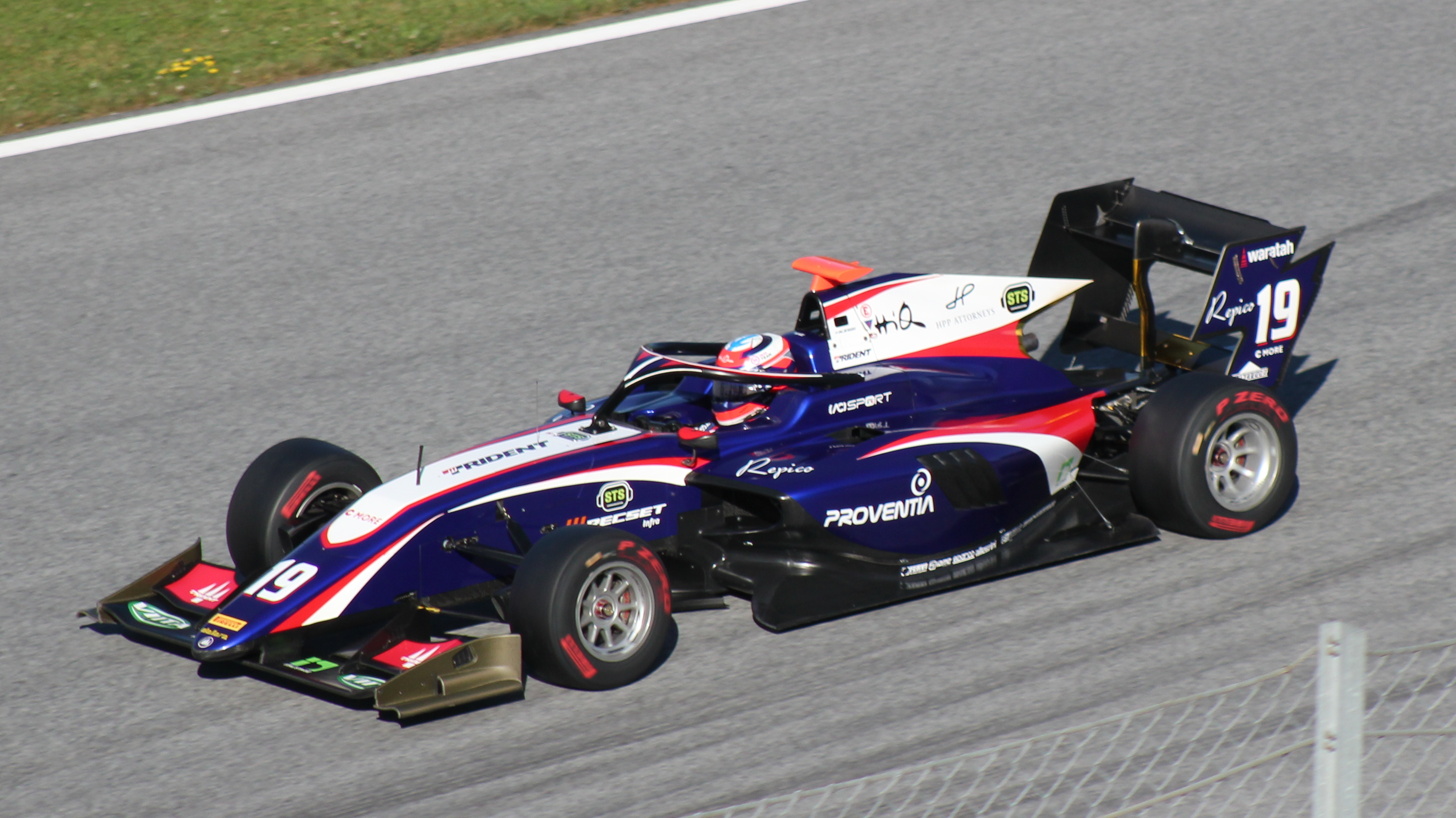 Kari beim Rennwochenende in Österreich 2019